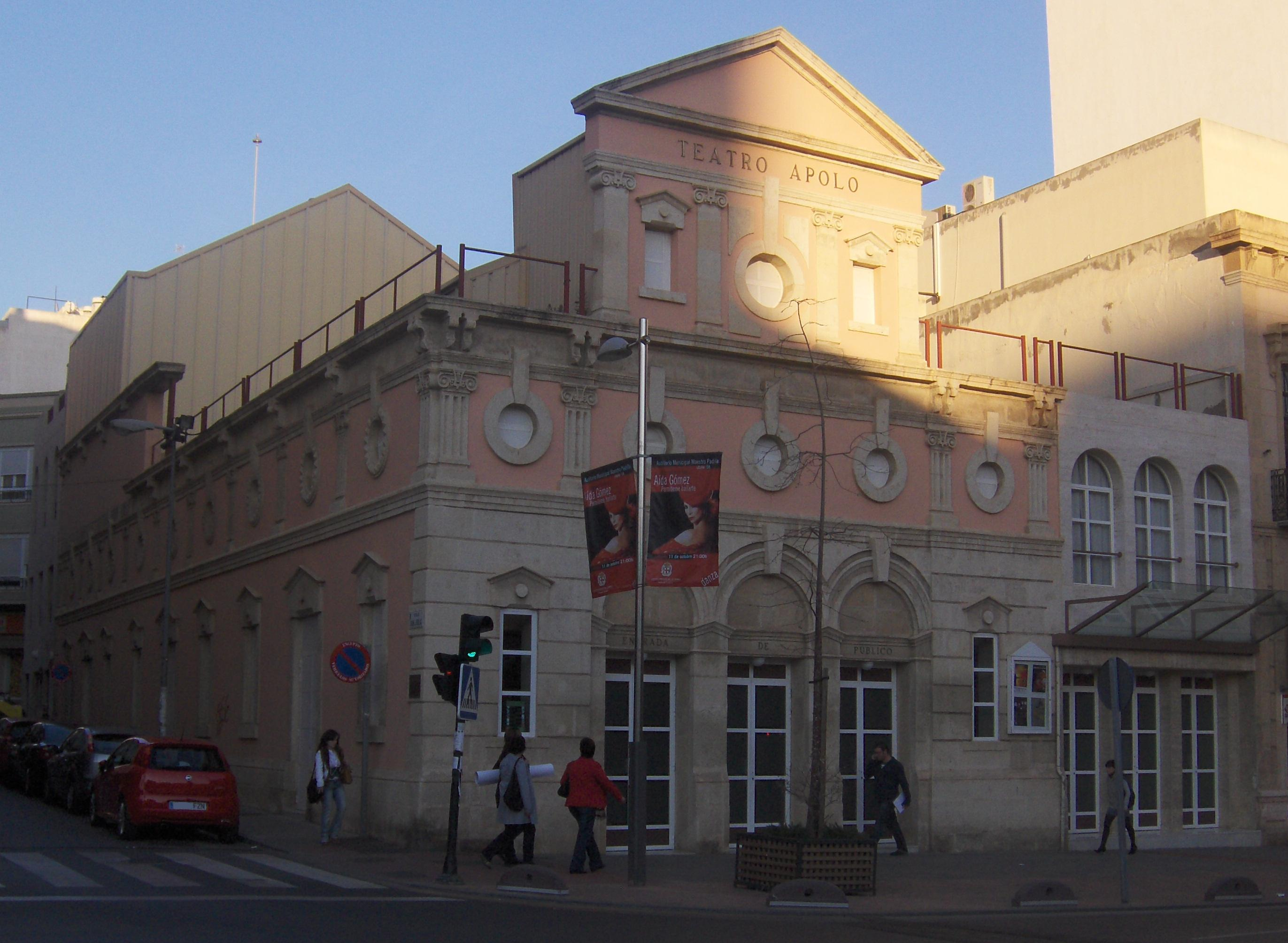 teatro Apolo de Almería